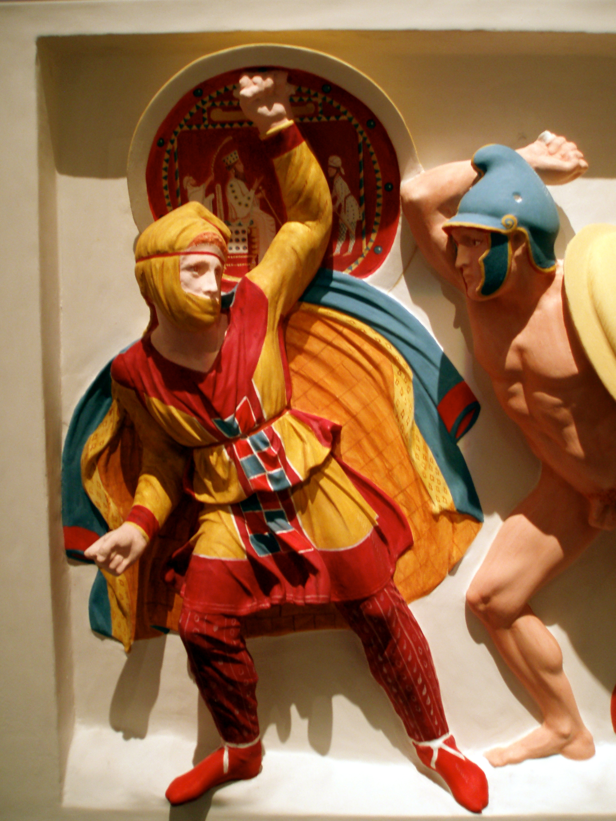 Restitution du décor polychrome du sarcophage dit d'Alexandre, provenant de la nécropole royale de Sidon, représentant la bataille d'Issos. Etude : Vinzenze Brinkmann et Ulrike Koch-Brinkmann. Stéréolithographie : Alphaform, Munich. Restauration des parties manquantes : Joseph Kotti, Sylvia Kellner. Peinture : Ulrike Koch-Brinkmann. Original : Musée national archéologique d'Istanbul. Exposition « Bunte Götter » dans la version montrée à Athènes.